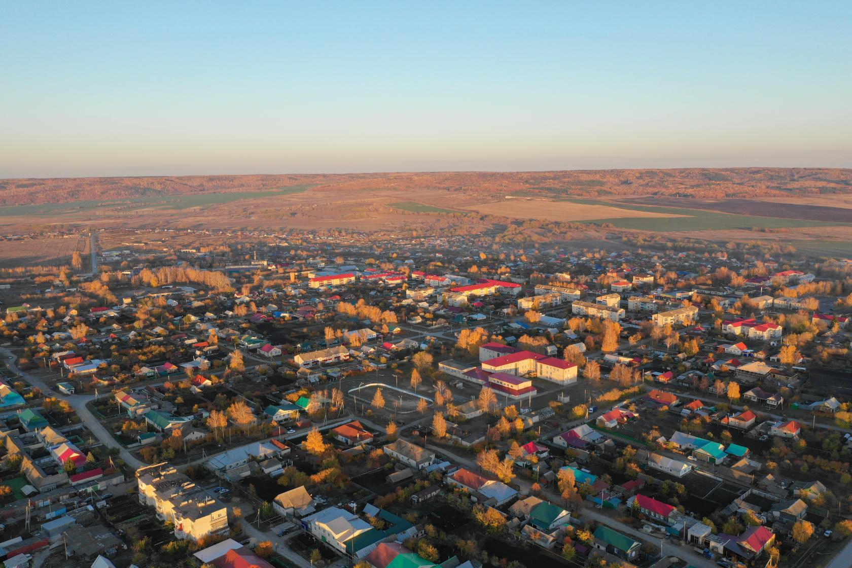 karsun